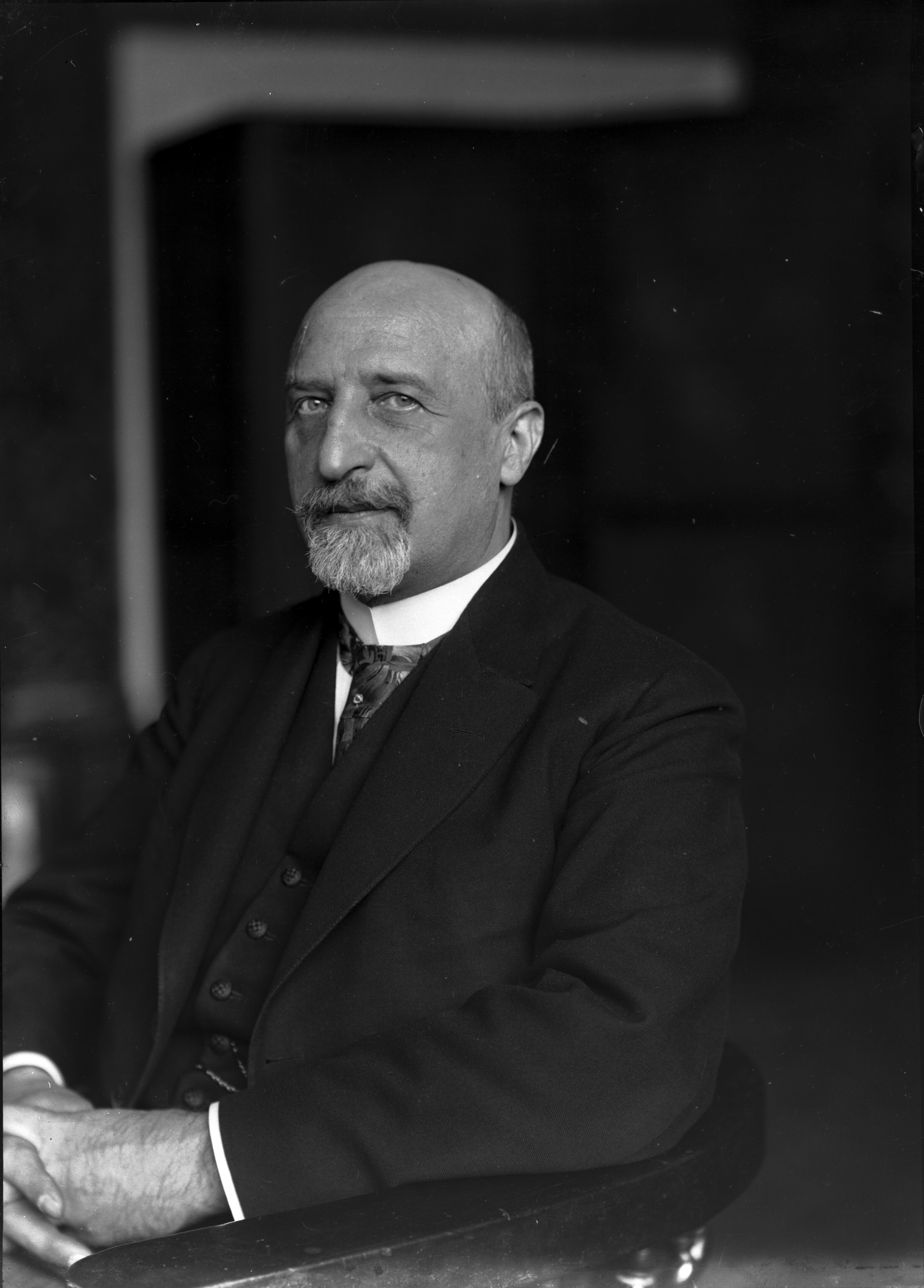 Karl Seitz, Bürgermeister von Wien, zuvor Präsident des österreichischen Staatsrates.